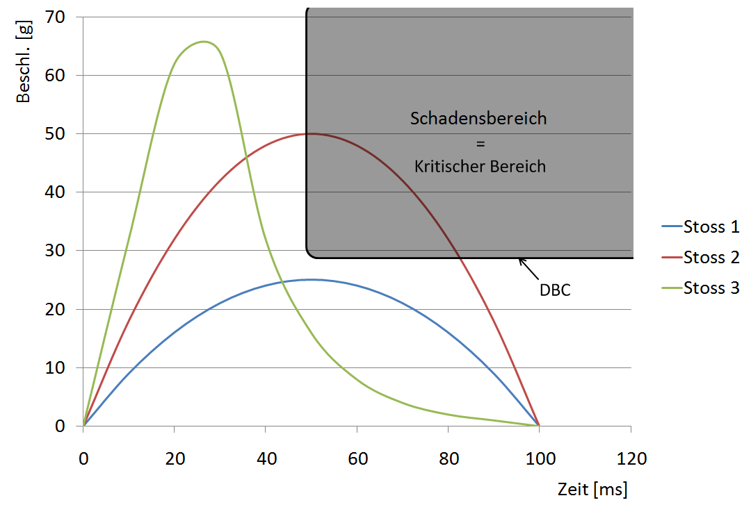 Stossdiagramm mit DBC und drei Stössen, wobei ein Stoss den kritischen Bereich über der DBC berührt.